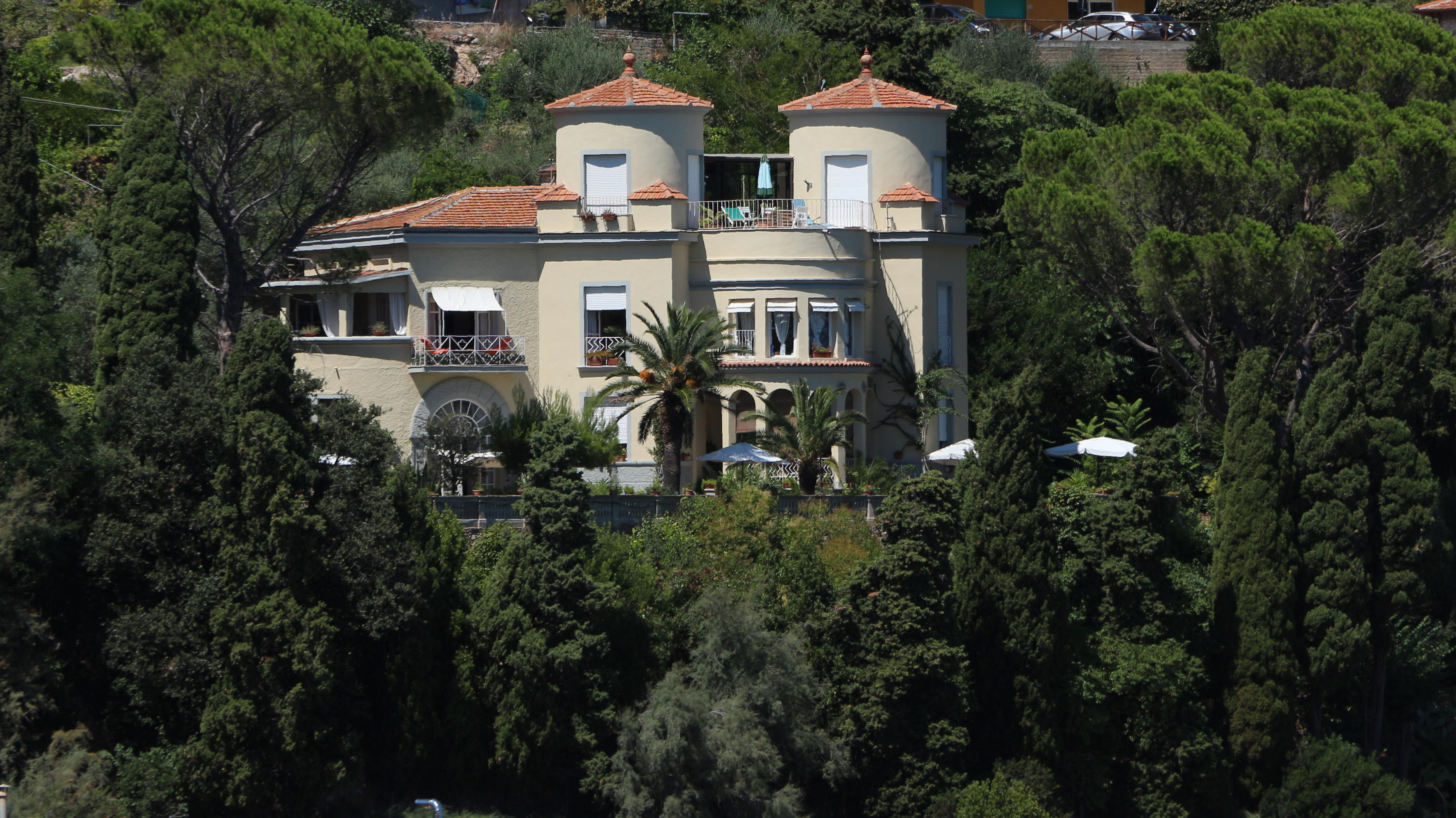 Villa la Giocondiana di Porto Santo Stefano, anni 1920